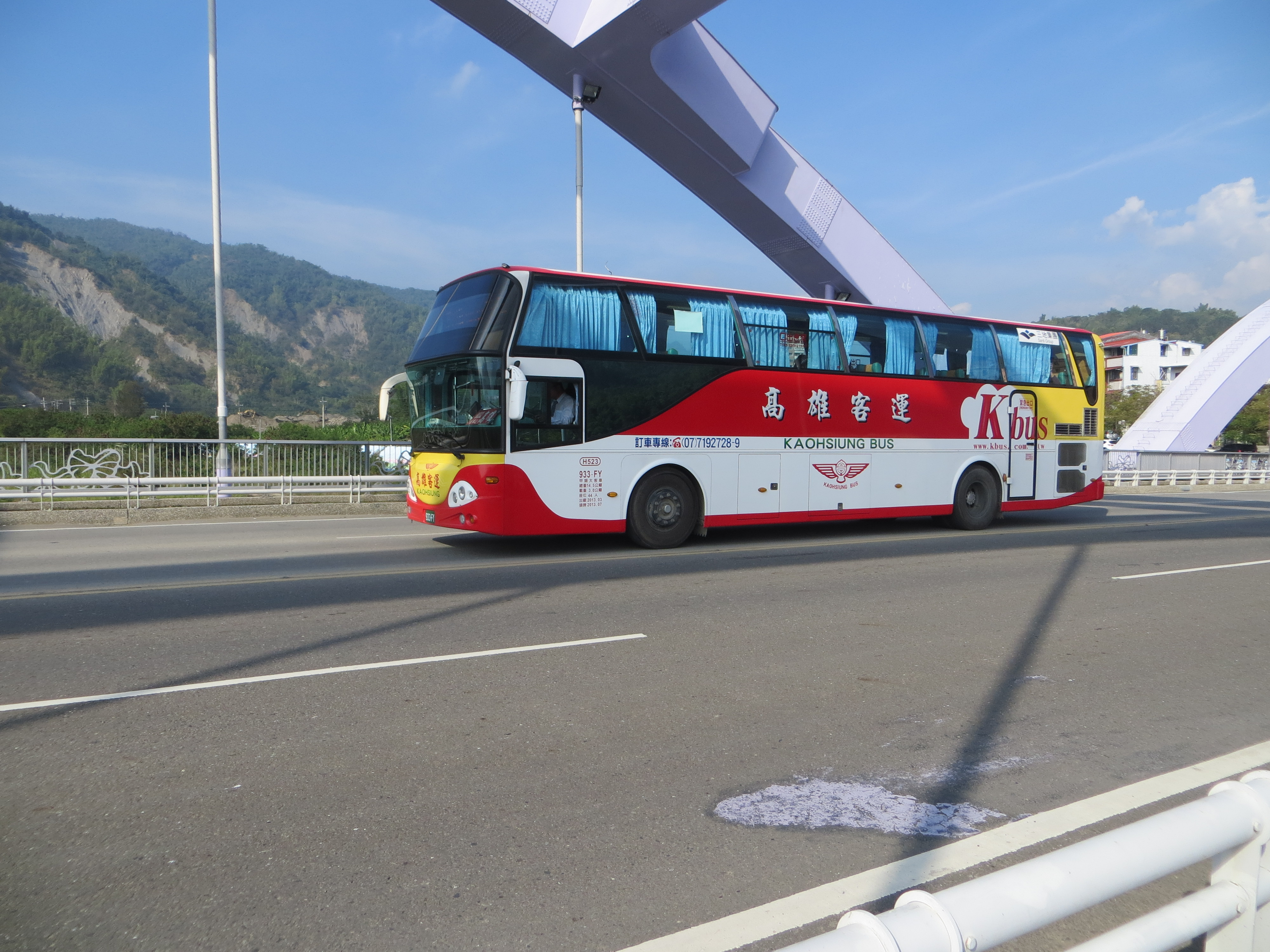 2016年1月9日，用於8032路線的高雄客運日野RK8JRVA大客車933-FY，駛過甲仙大橋向旗山、高雄市區進發。